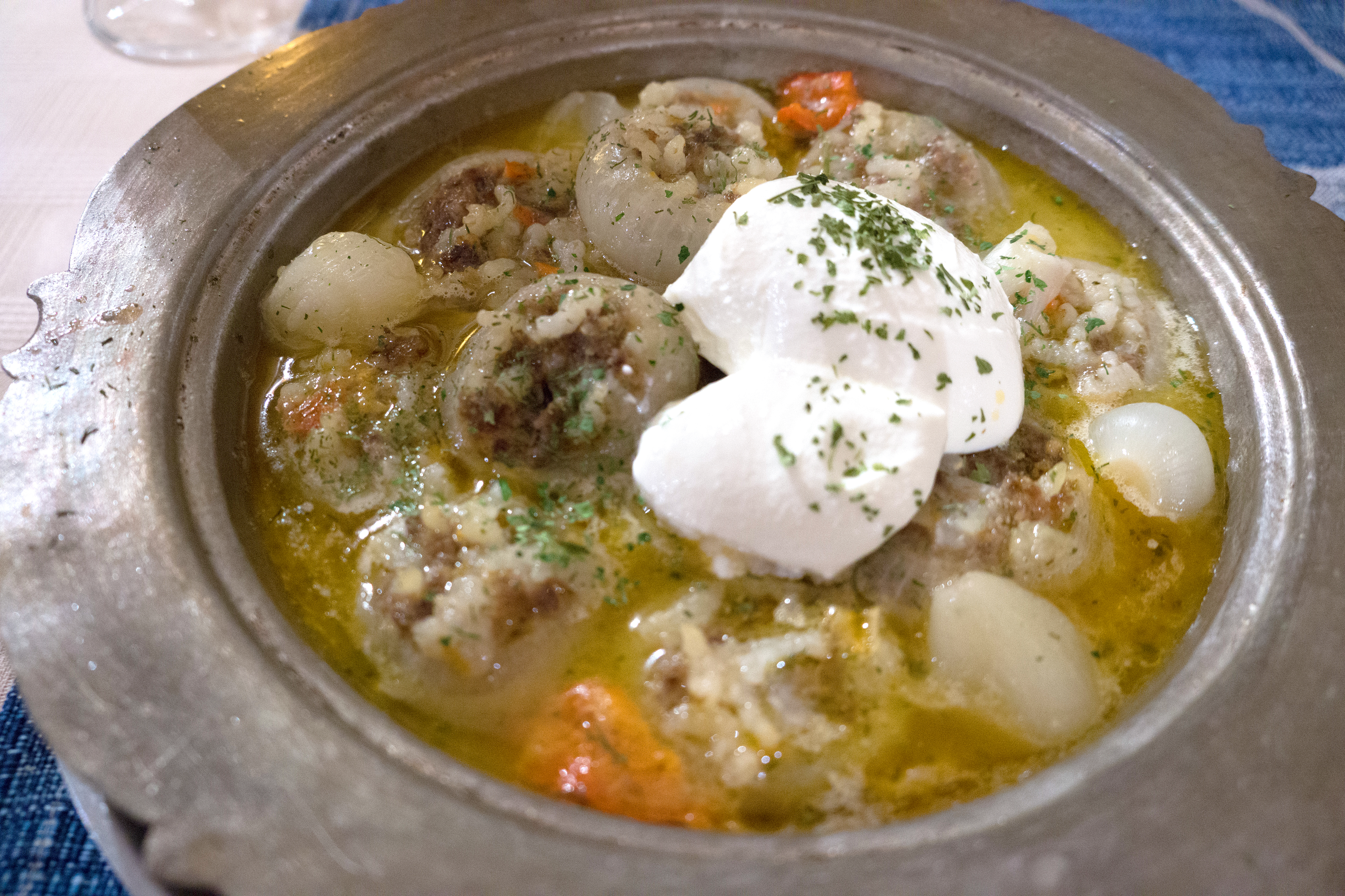 Une assiette de sogan-dolma.